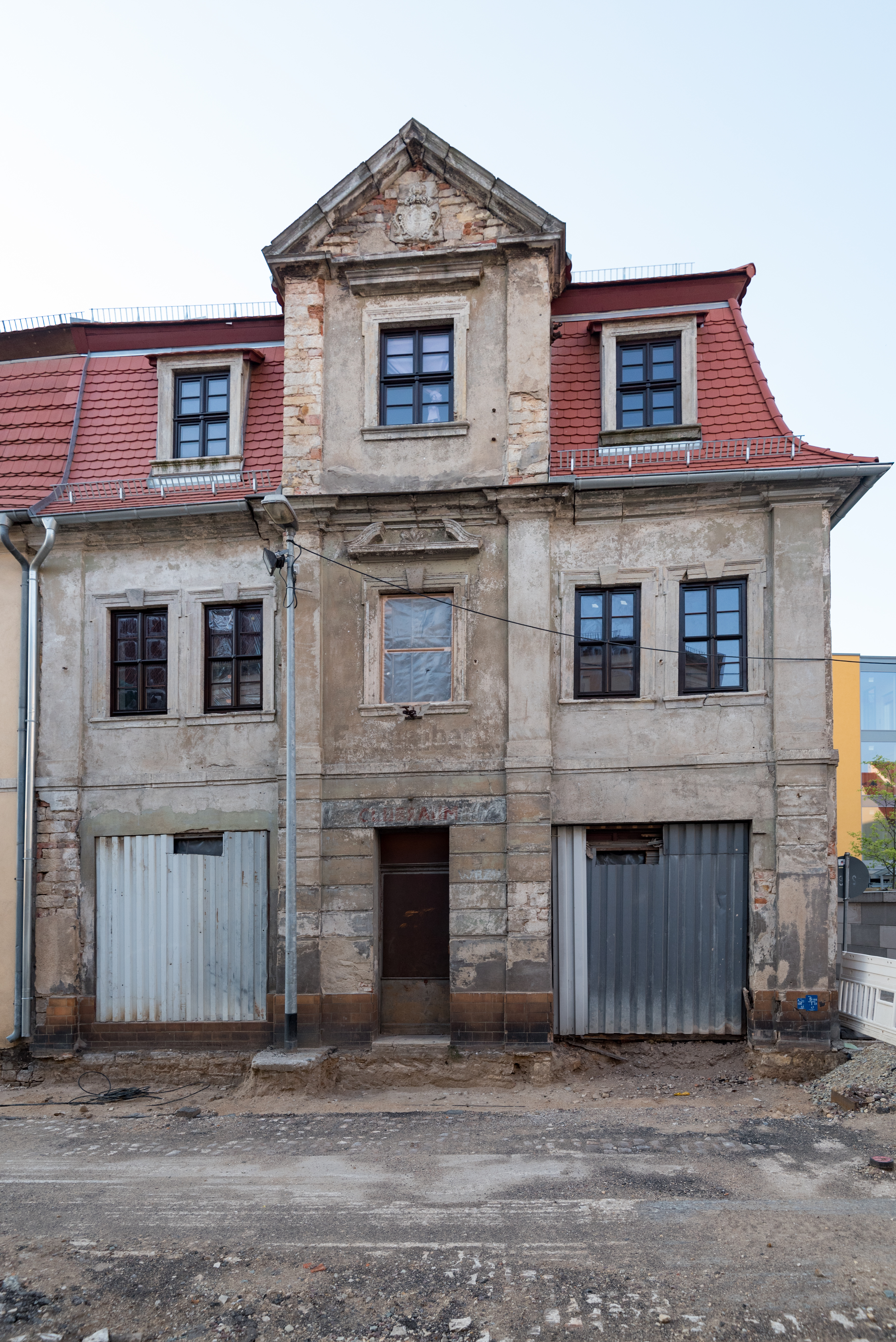 Weißenfels, Klosterstraße 11